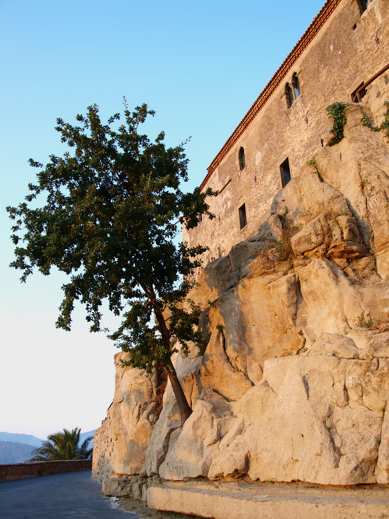 Il Castello "Grande" di Castiglione di Sicilia, di origine normanna (XII sec.), fu anche residenza dell'ammiraglio Ruggiero di Lauria